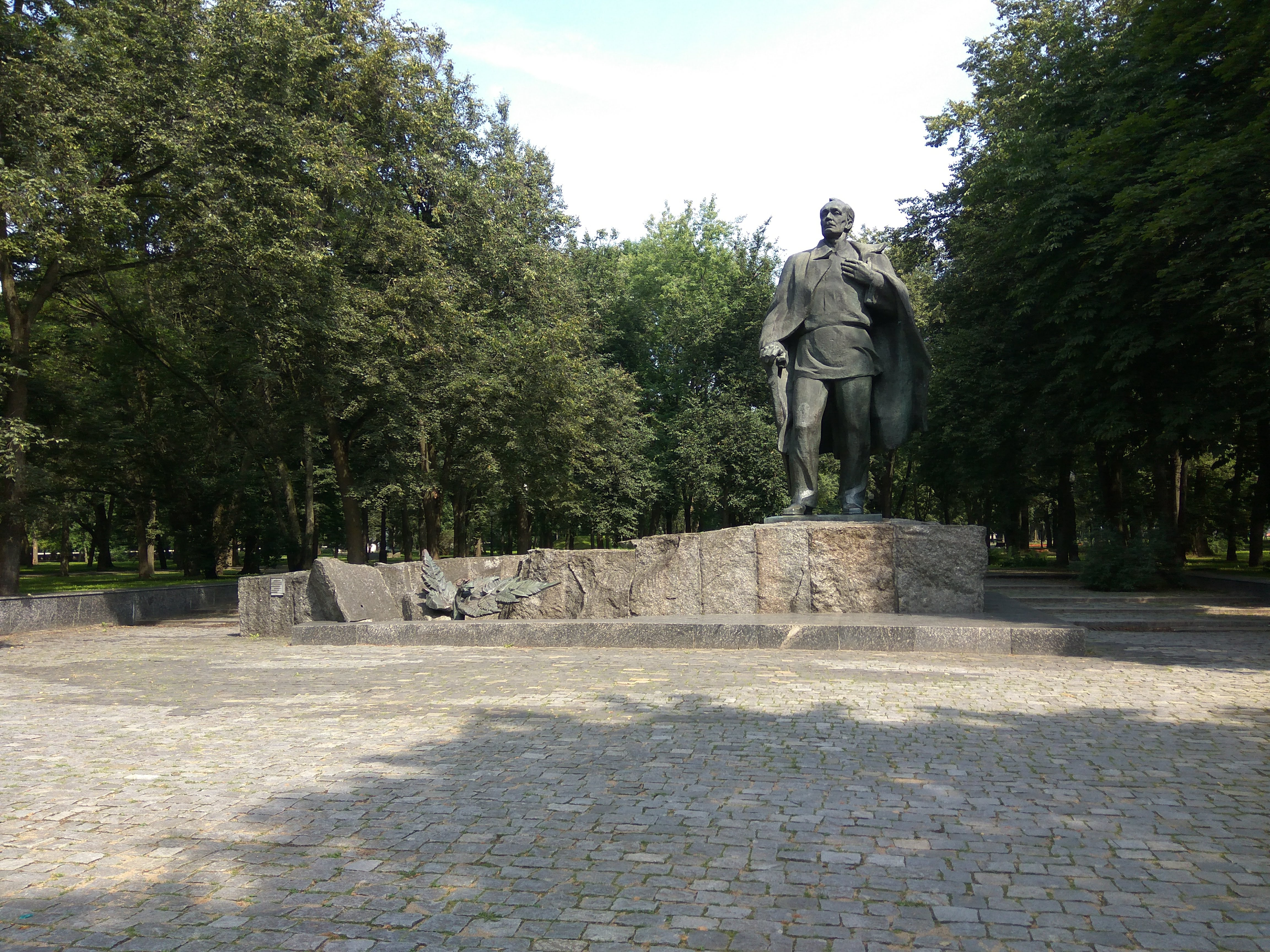 Мінск. Парк Янкі Купалы